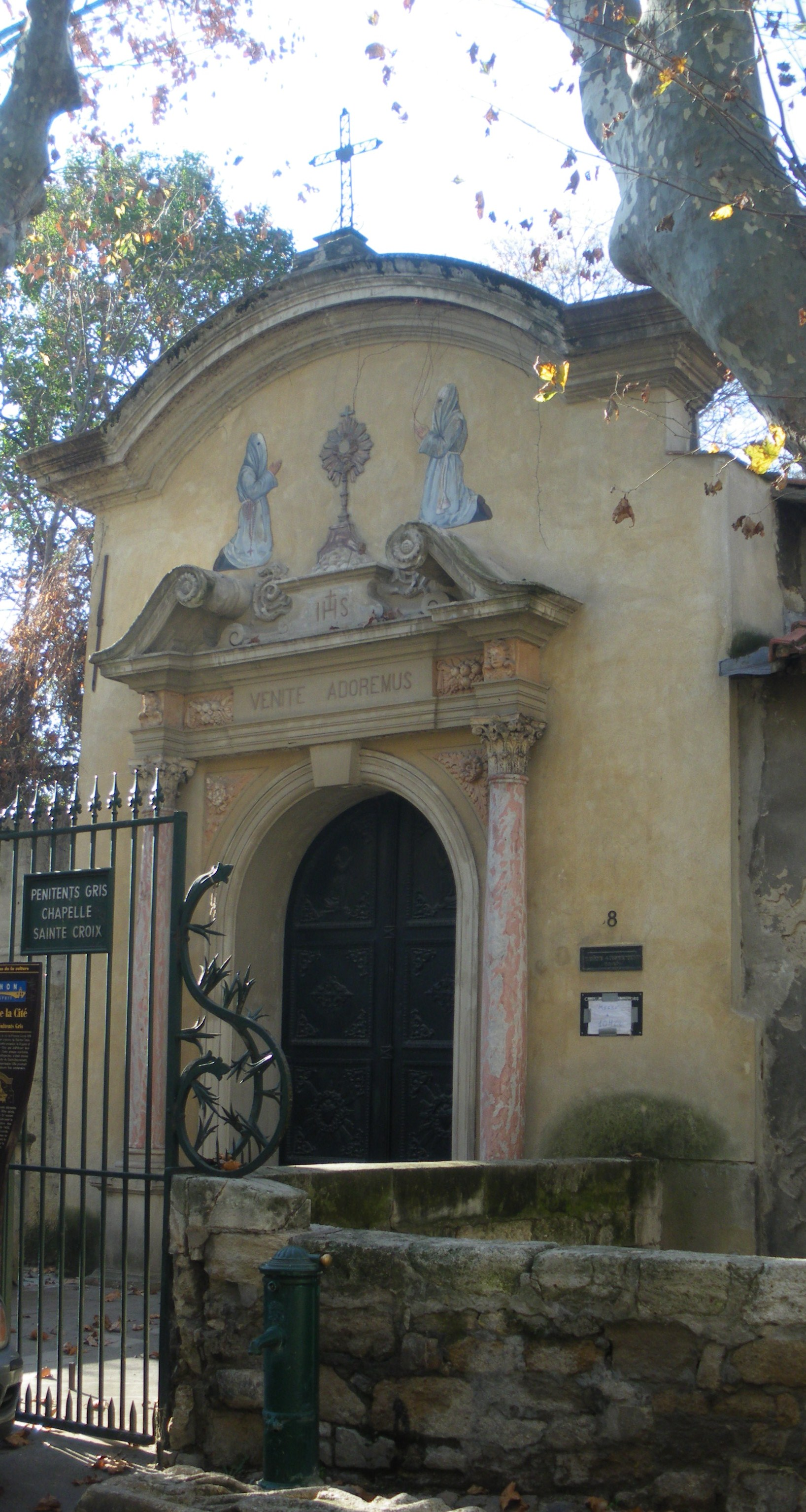 Chapelle des Pénitants Gris, à Avignon